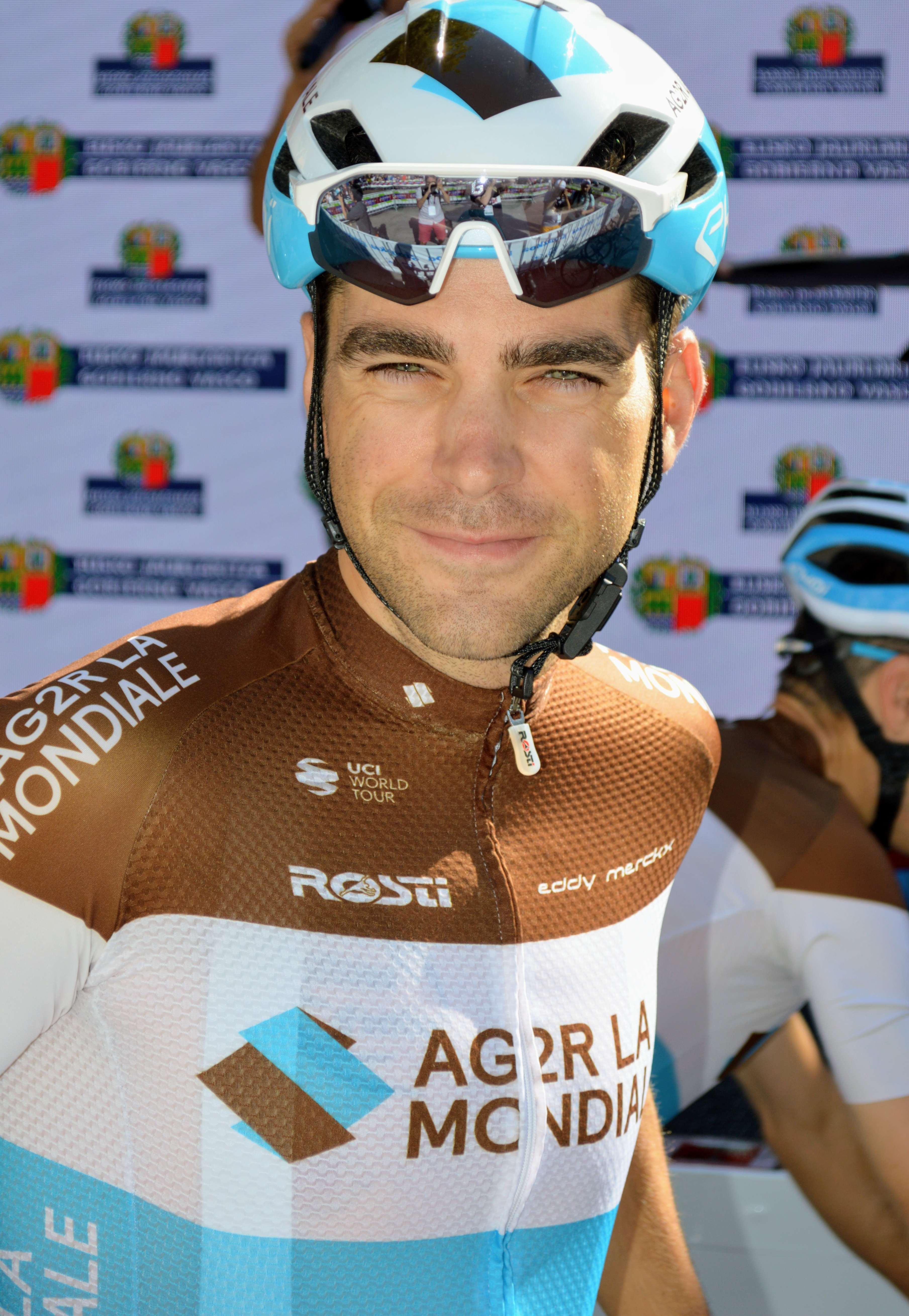 Tony GALLOPIN - Août 2019 (Clasica San Sebastian)